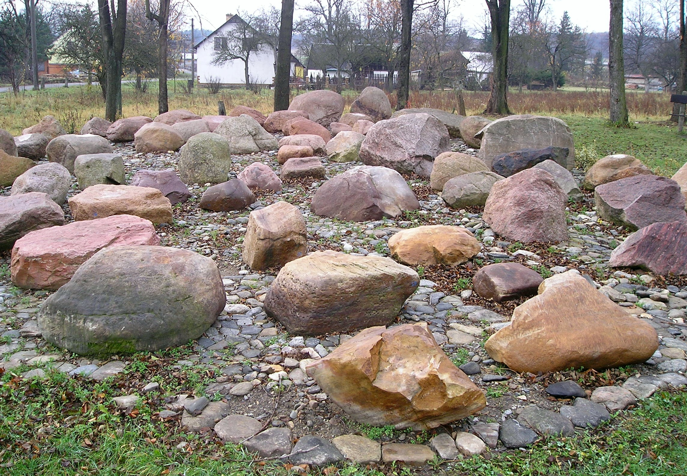 Celkový záběr na expozici.